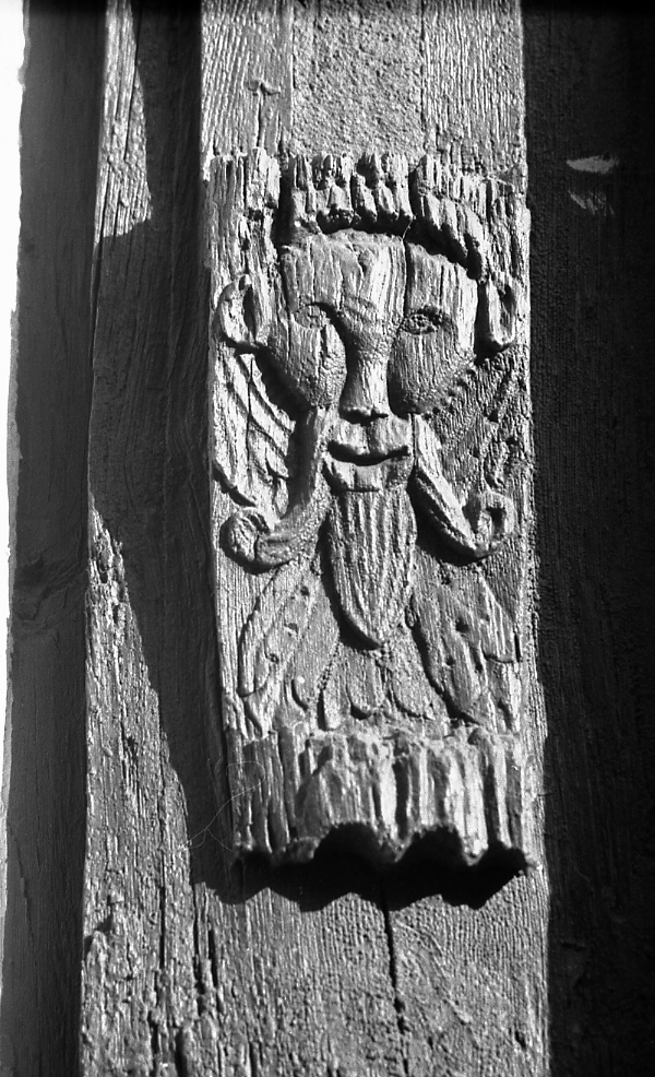 geschnitzter Neidkopf am Haus Braunstraße 2-4 in Michelstadt